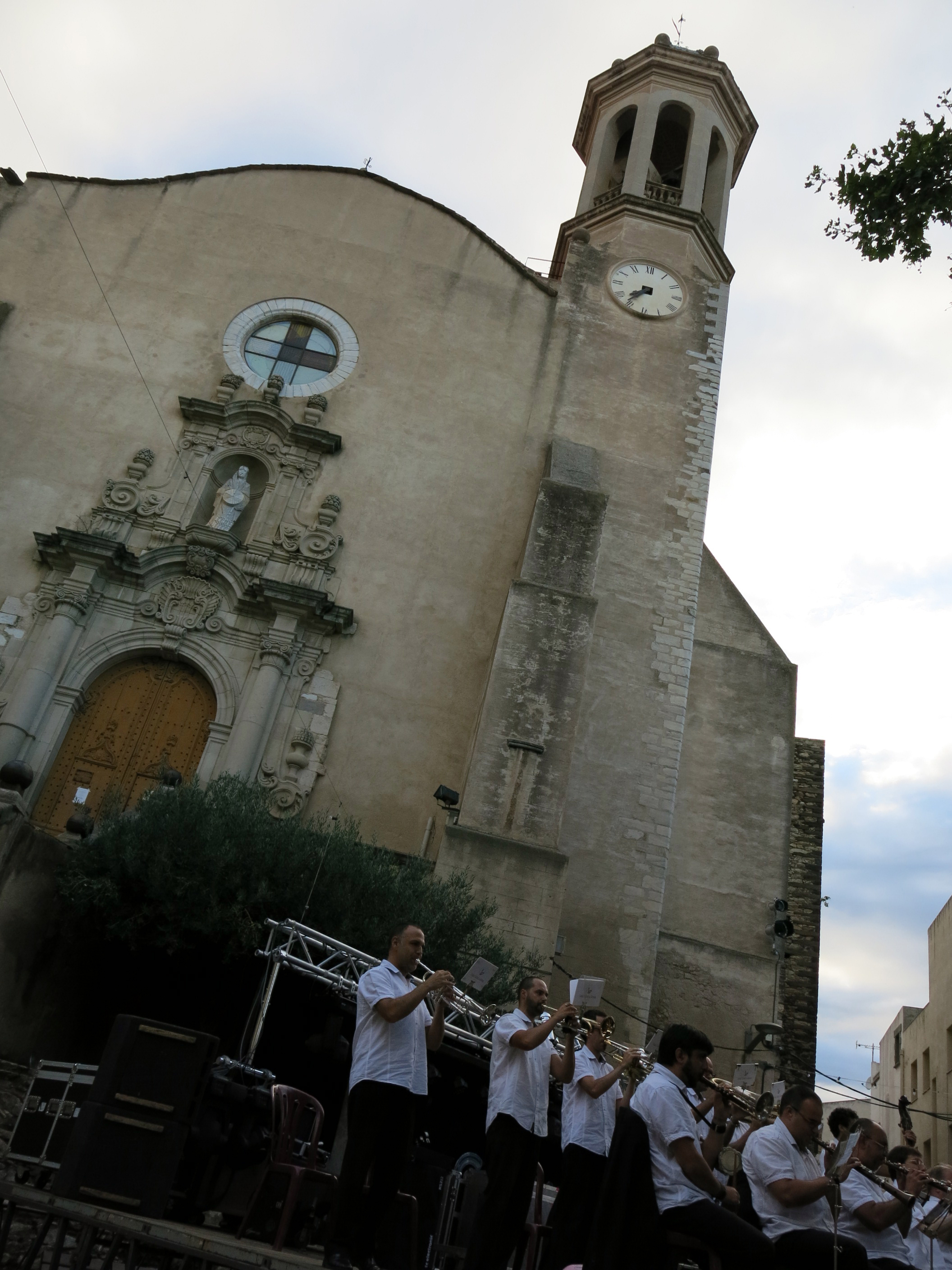 Església parroquial de Sant Vicenç de Llançà (Llançà)